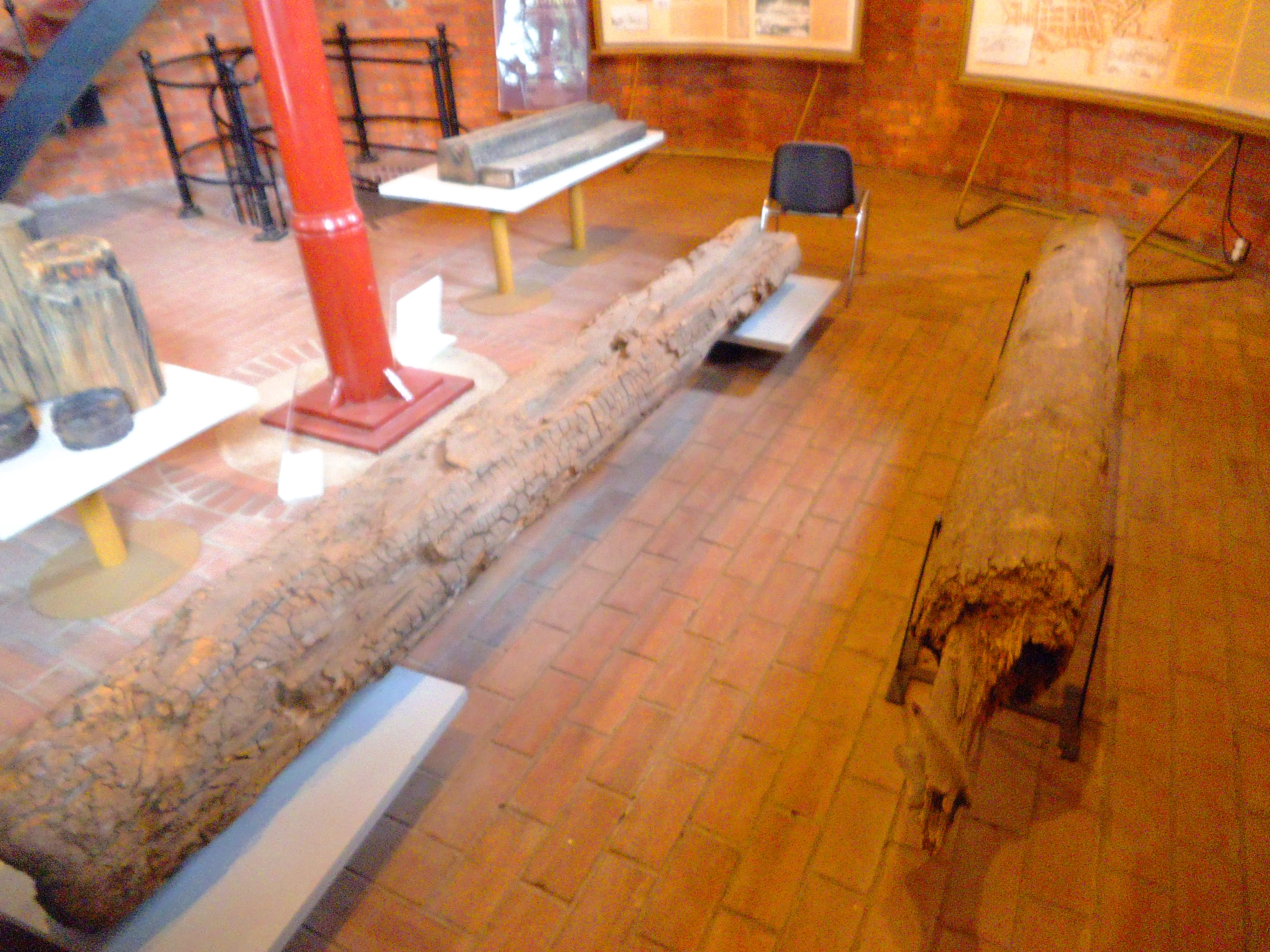 Muzeum Techniki i Inżynierii Komunalnej Torunia8